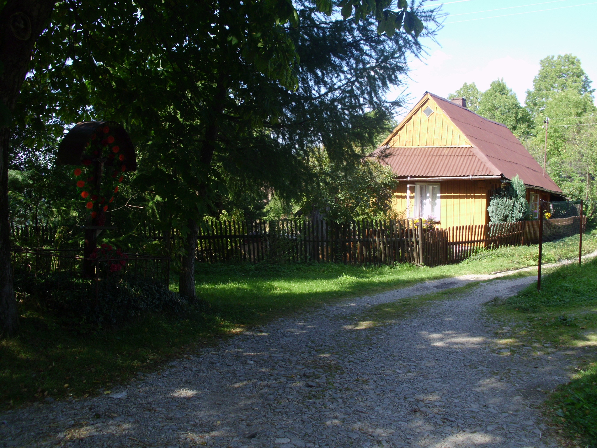 Suchedla (Radziechowy) - centrum. Stary dom drewniany nr 204 oraz krzyż przydrożny na skrzyżowaniu w centrum przysiółku.